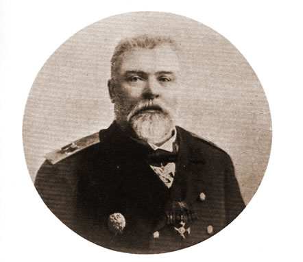 Nikolai Ivanovich Nebogatov (Николай Иванович Небогатов) Russian Admiral (b.1849-d.1922)